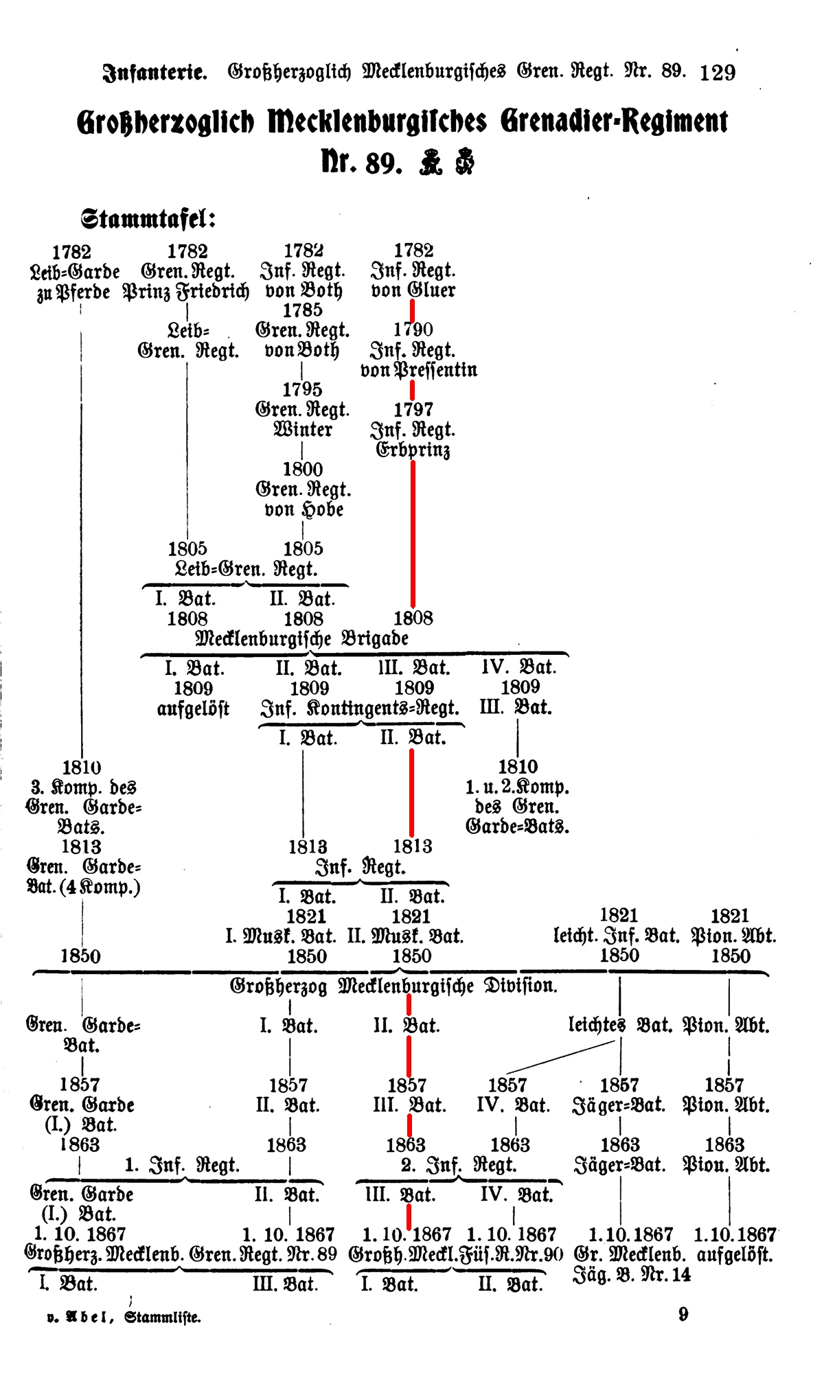 Stammtafel F.R. Nr. 90 u. G.R. Nr. 89